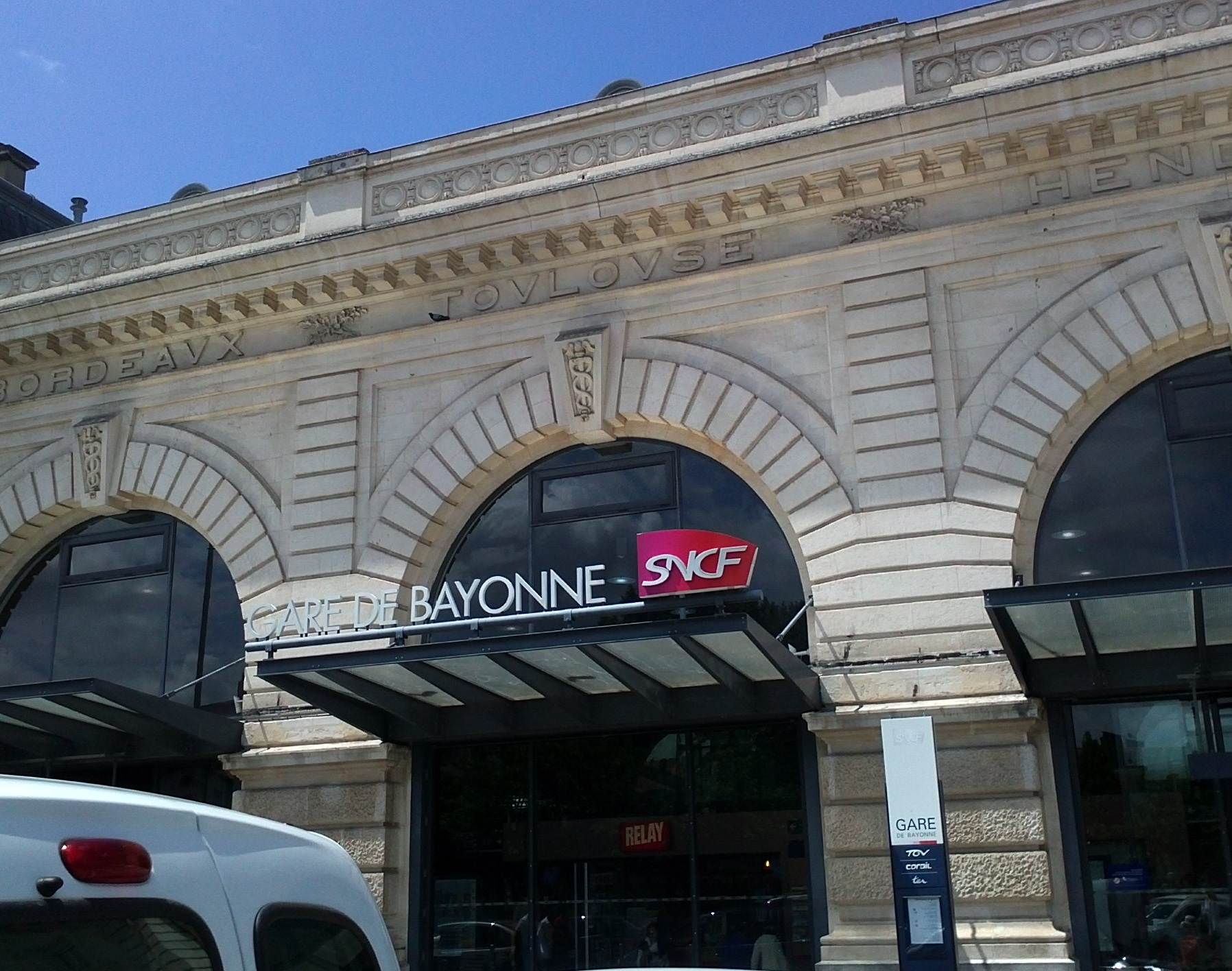 Gare de Bayonne-2012